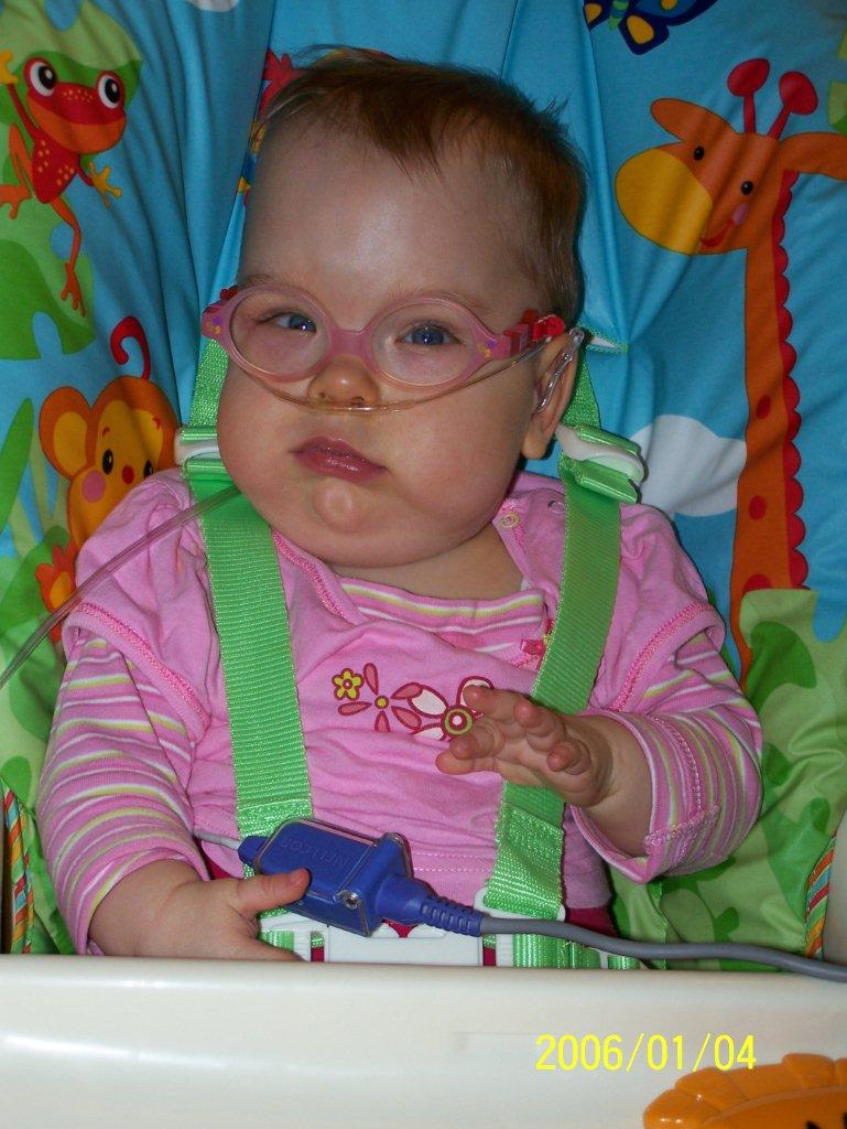 pierwsze okulary